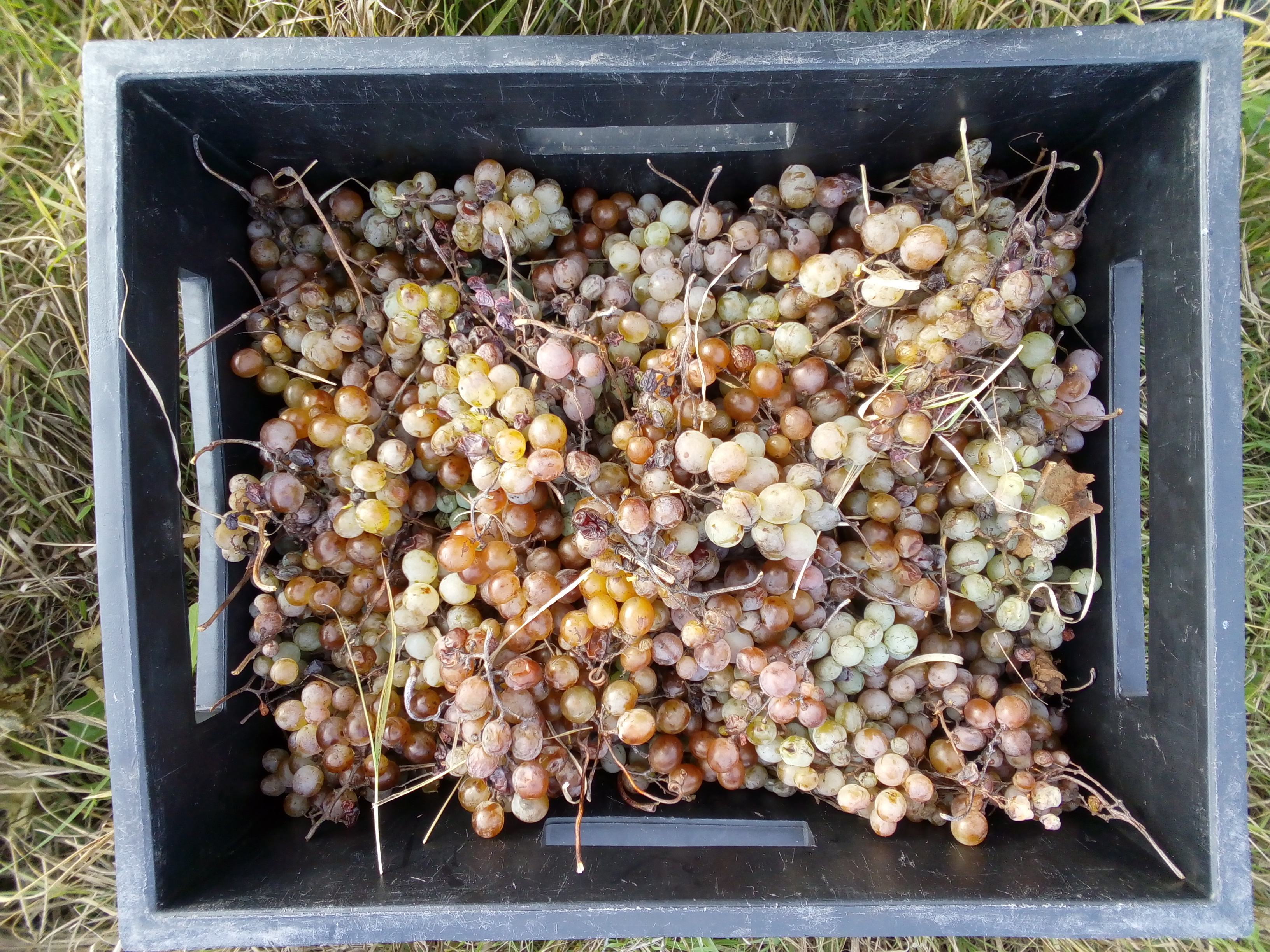 Виноград, зібраний у вересні на півдні Одеської області